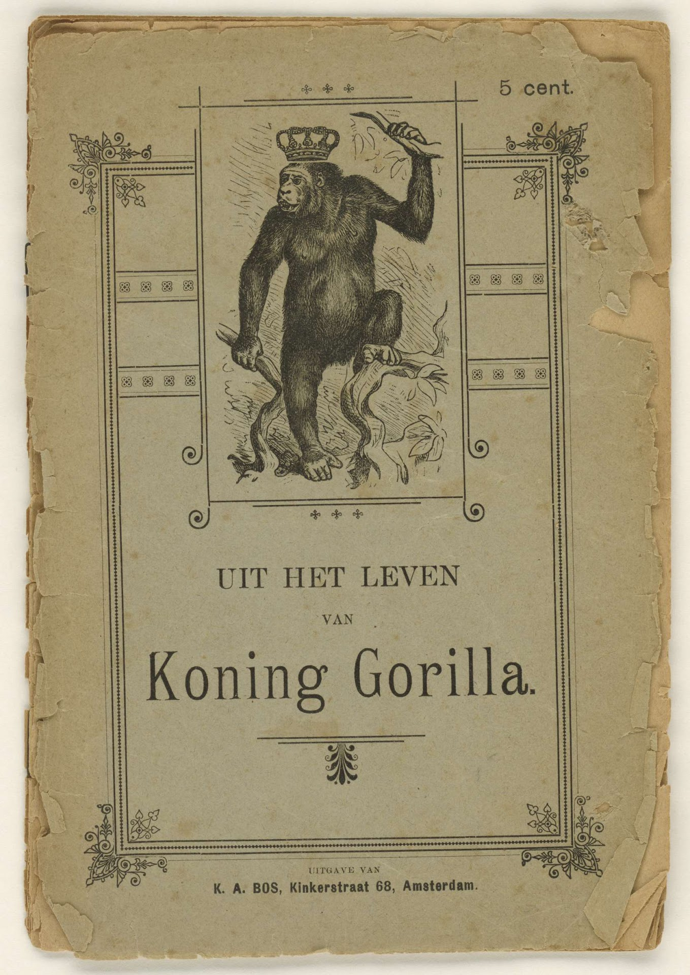 Titelblad van het schotschrift Uit het leven van Koning Gorilla (1887), anoniem uitgegeven maar toegescheven aan Sicco Ernst Willem Roorda van Eysinga, dat over de minder fraaie kanten van het leven van koning Willem III der Nederlanden verhaalt.